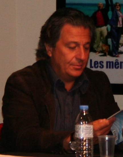 Séance de dédicaces avec l'équipe des Bronzés organisée par la Fnac des Halles.